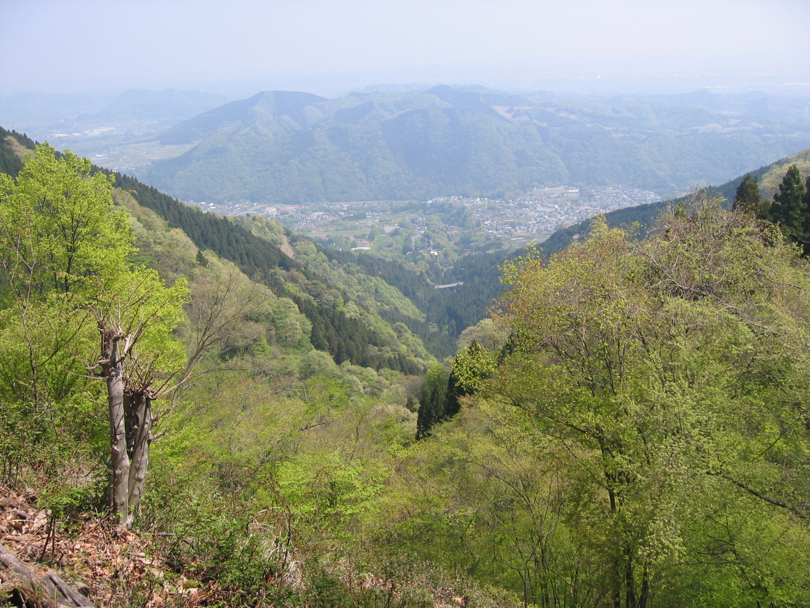 宮ヶ瀬越からの眺望